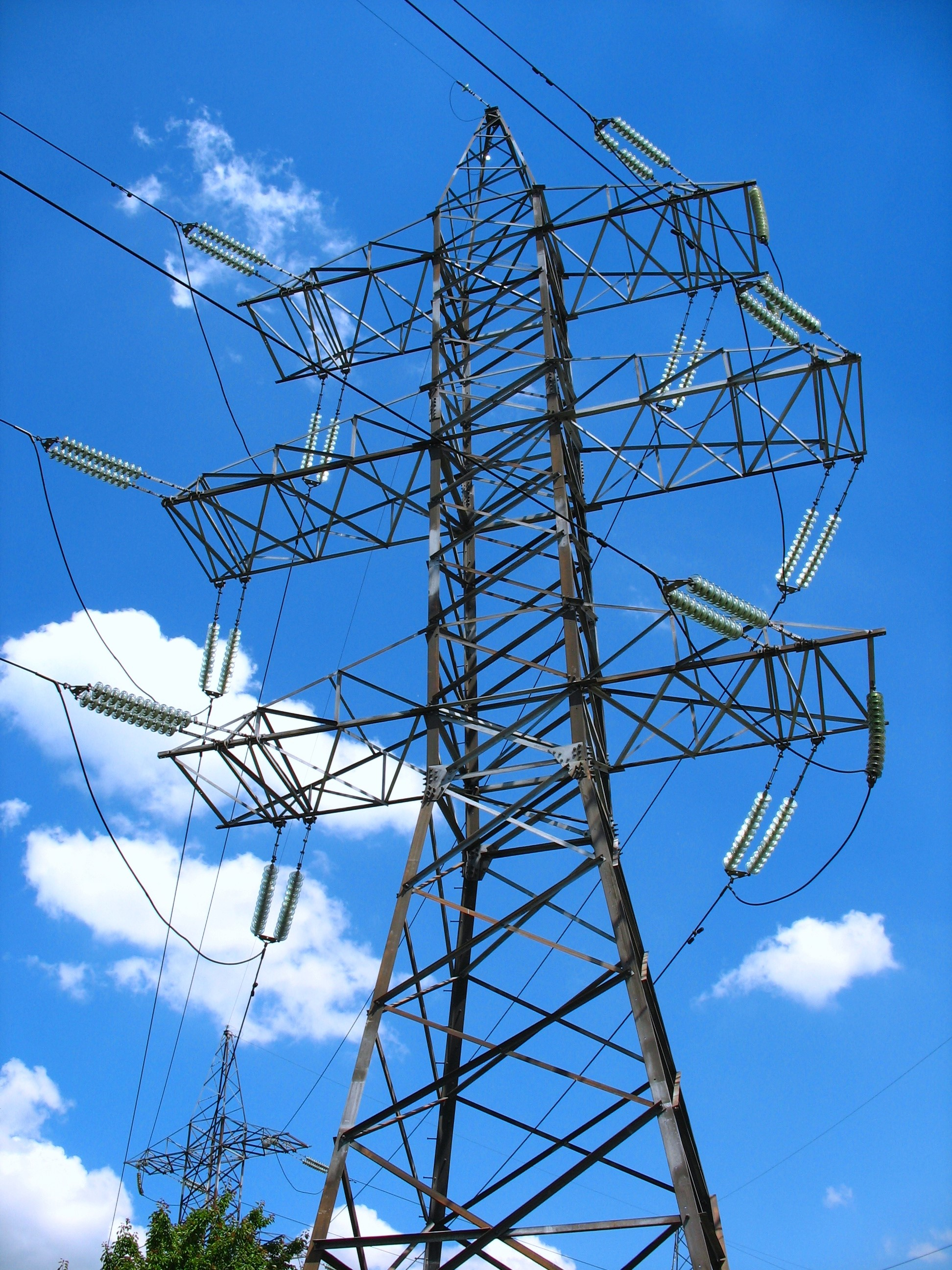 Анкерно-угловая опора ЛЭП 150кВ. Жилой массив "Северный", город Днепр, Украина.